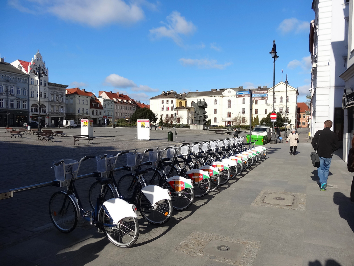 Stacja Bydgoskiego Roweru Aglomeracyjnego na Starym Rynku w Bydgoszczy